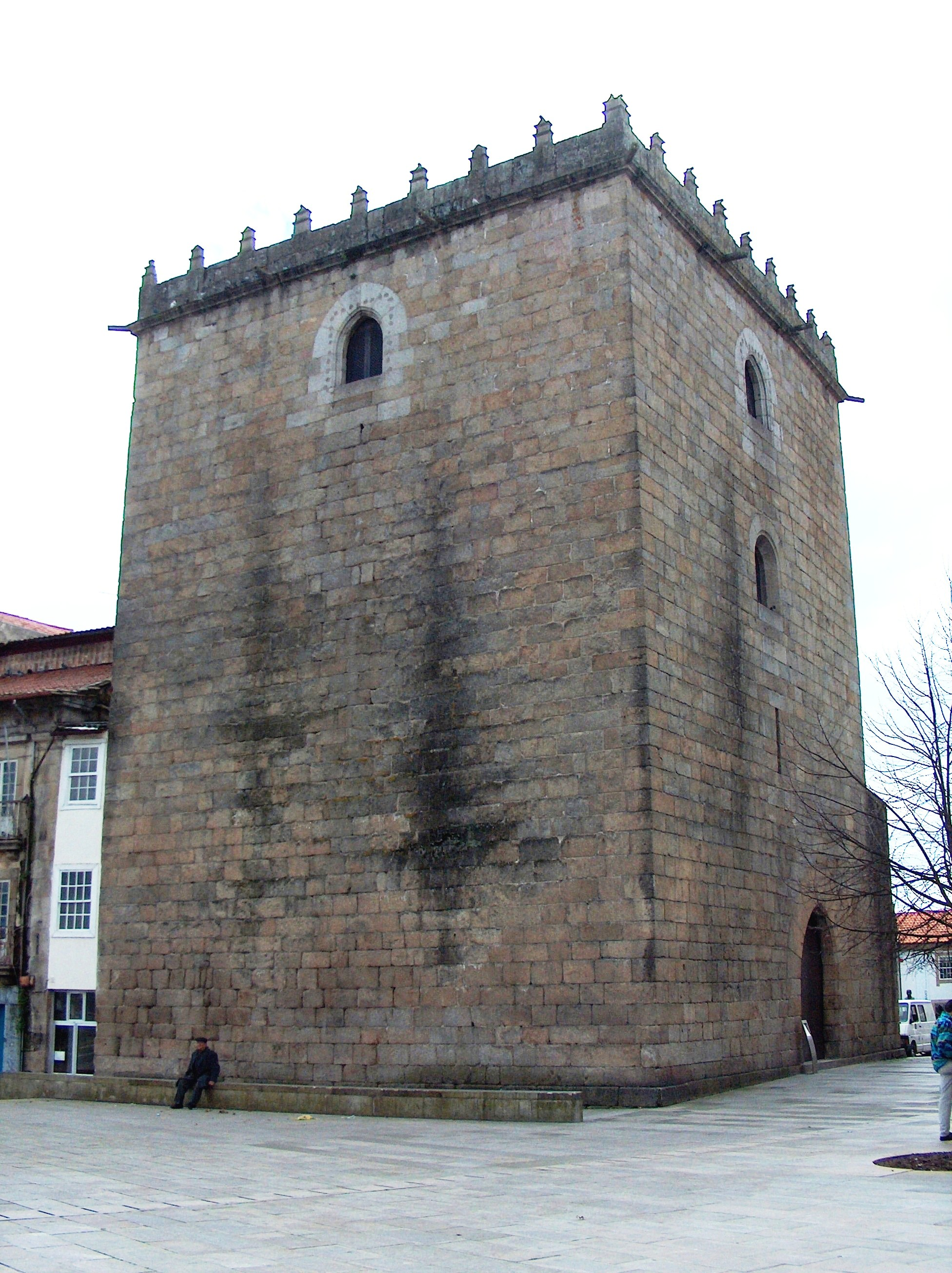 Torre do Cimo da Vila. Torre do Cimo da Vila, Barcelos, distrito de Braga, Portugal.